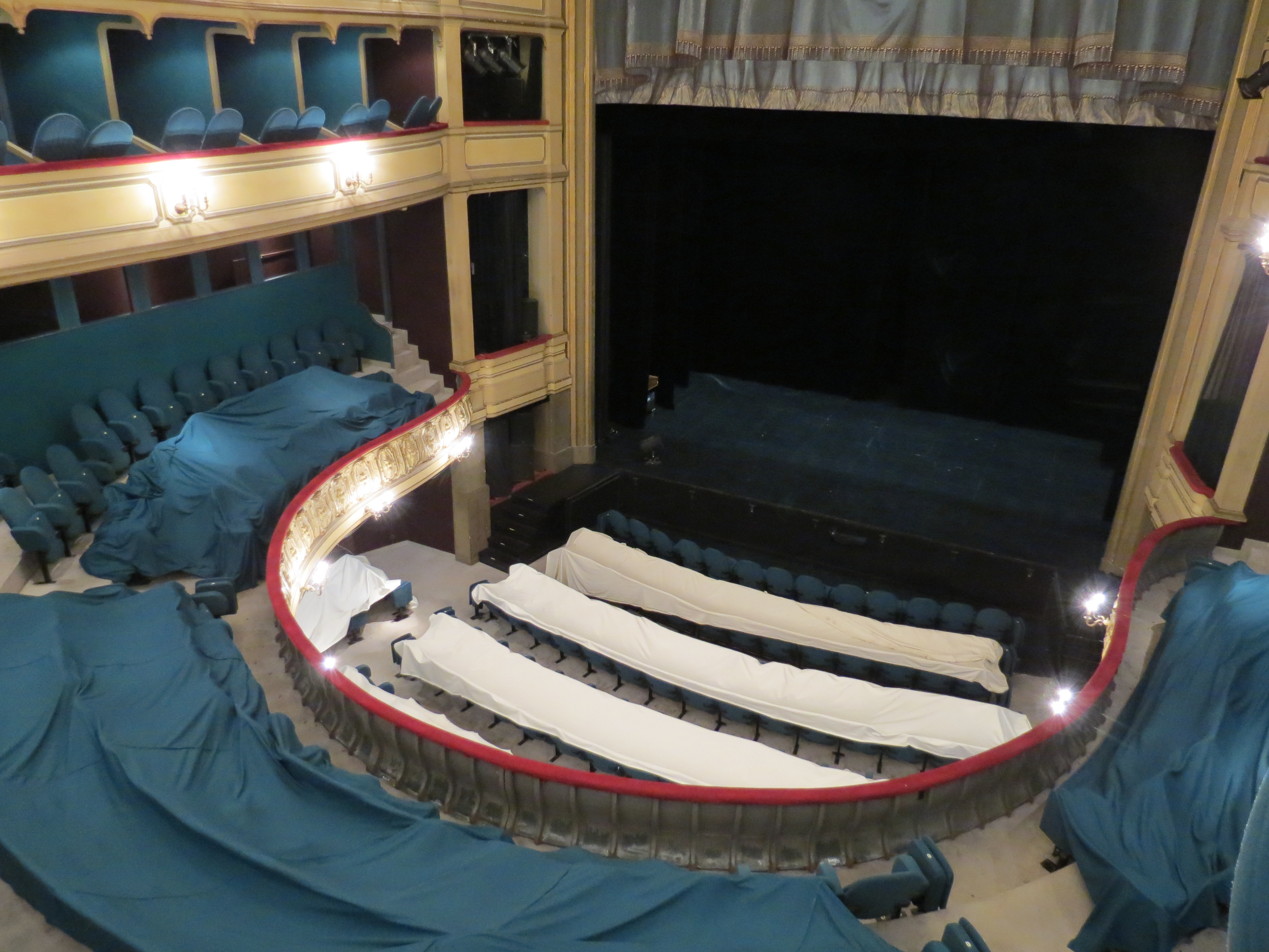 salle du Théâtre du Gymnase Marseille. Salle dite "à l’italienne"